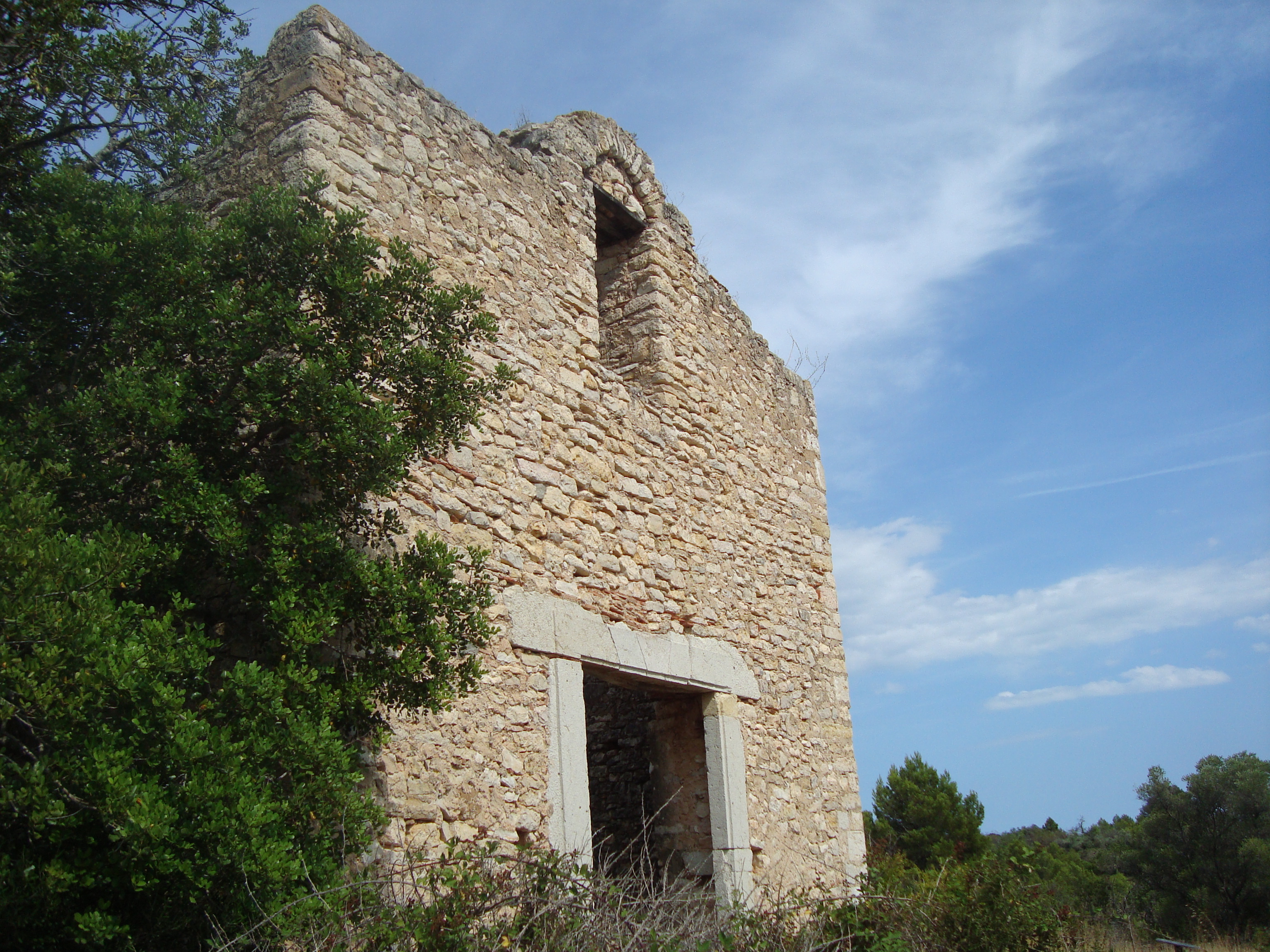 Fachada de la Ermita de San Miguel, Alcalà de Xivert, en la actualidad está en ruinas